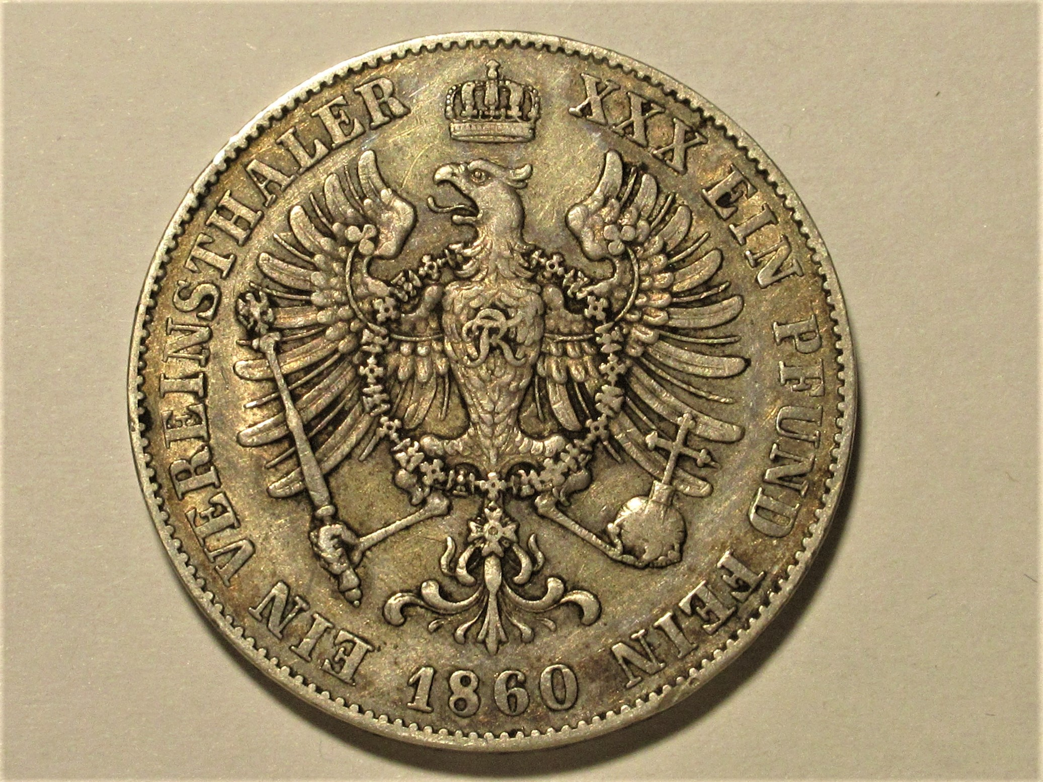 preußischer Vereinstaler von 1860 nach dem 30 Talerfuß des Wiener Vertrages